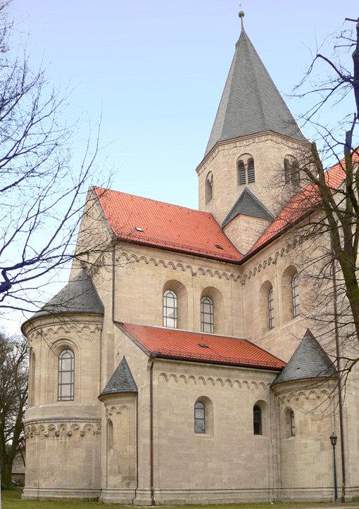 Stiftskirche St. Peter und Paul (Kaiserdom) Königslutter, Foto aufgenommen von Benutzer Axel Hindemith, April 2006